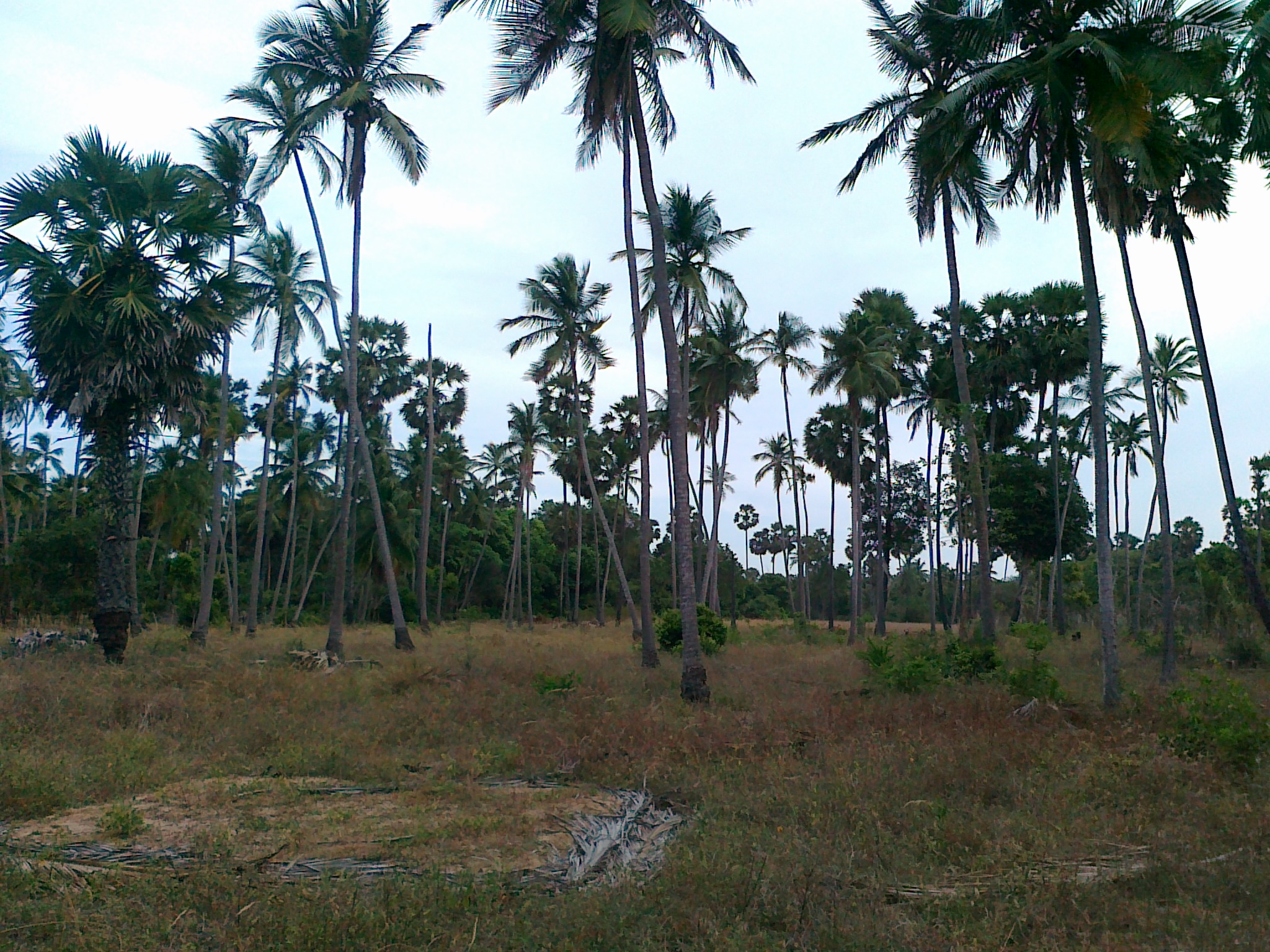 பனை தென்னை